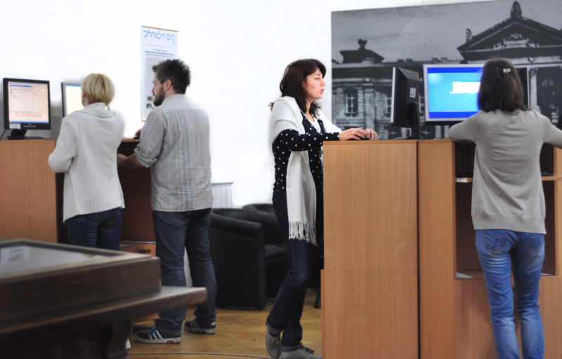 Српски (ћирилица): Хол Библиотеке